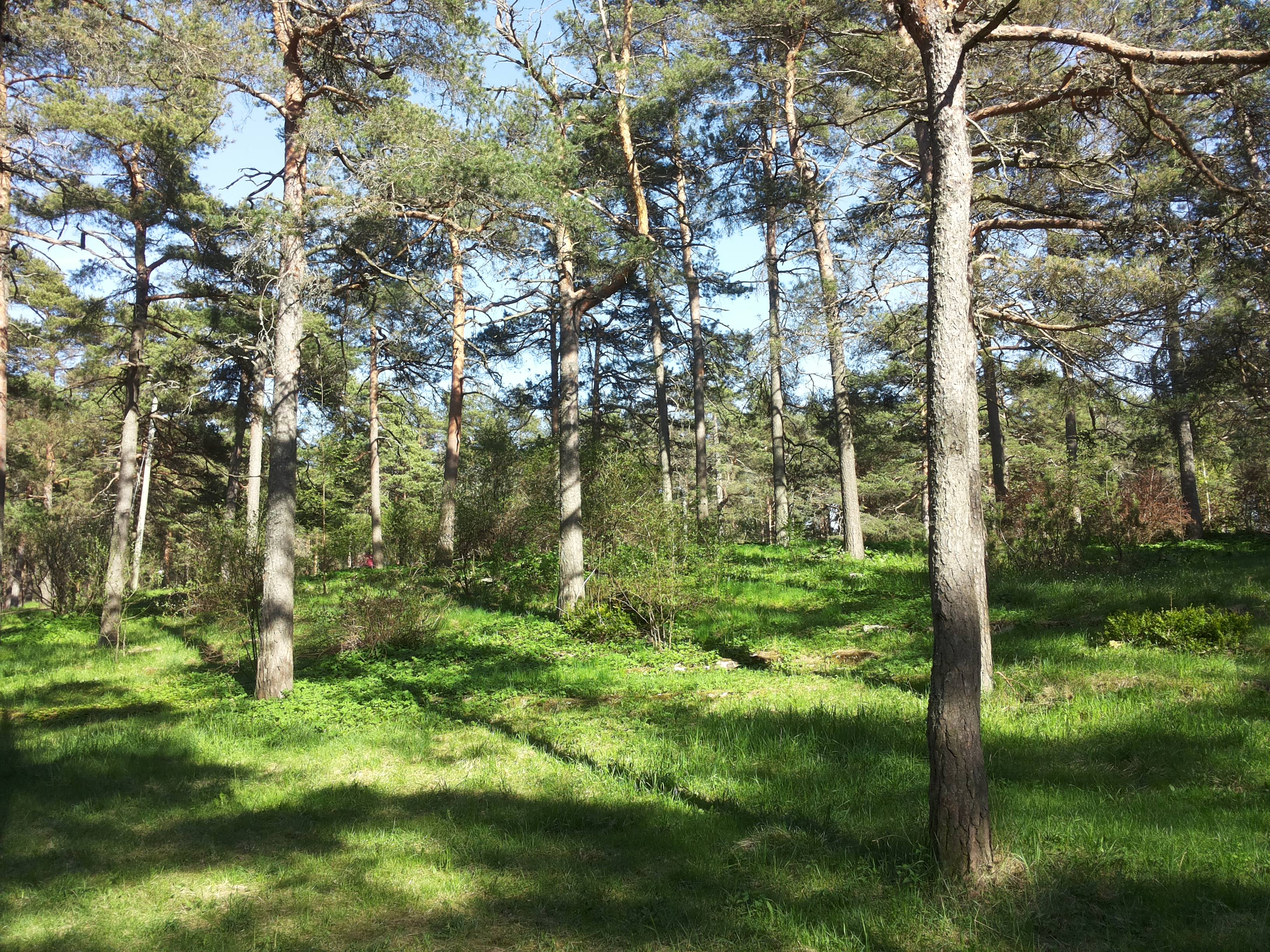 Vabaduse parkmets